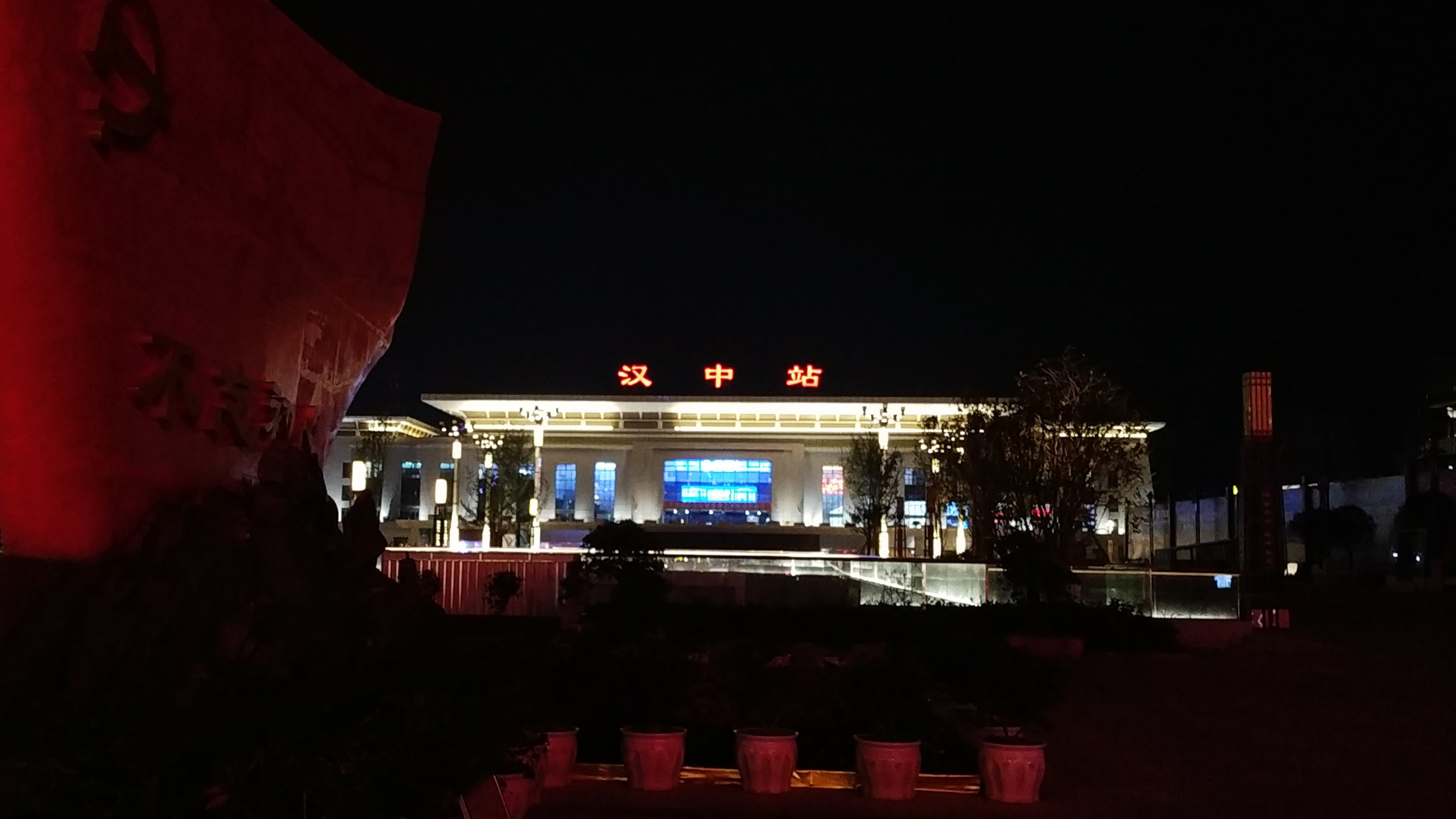 中文（中国大陆）: 汉中站夜景